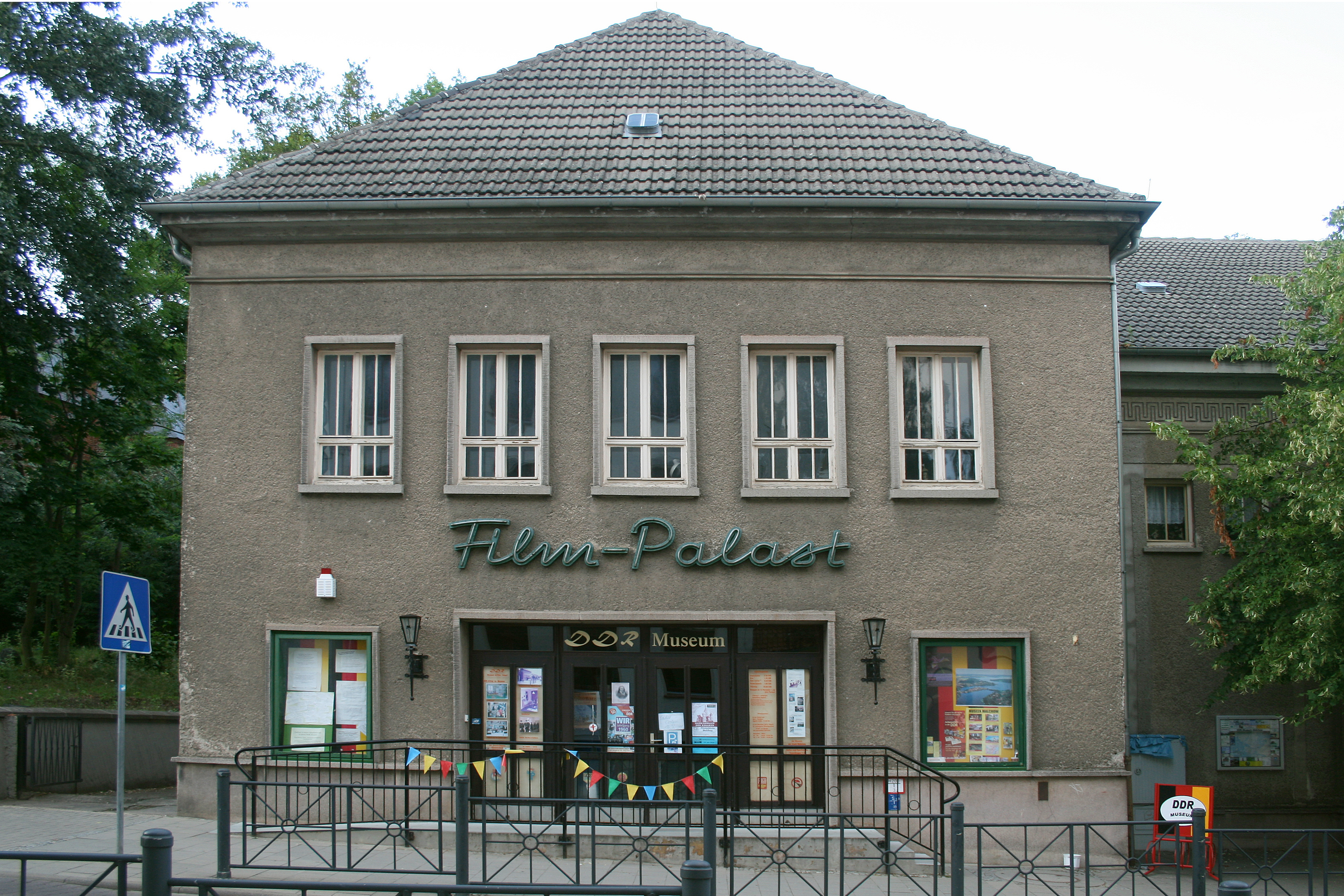 ehemaliger "Filmpalast" in Malchow (Mecklenburg-Vorpommern), 1957 als Kino und Veranstaltungssaal errichtet, heute DDR-Museum